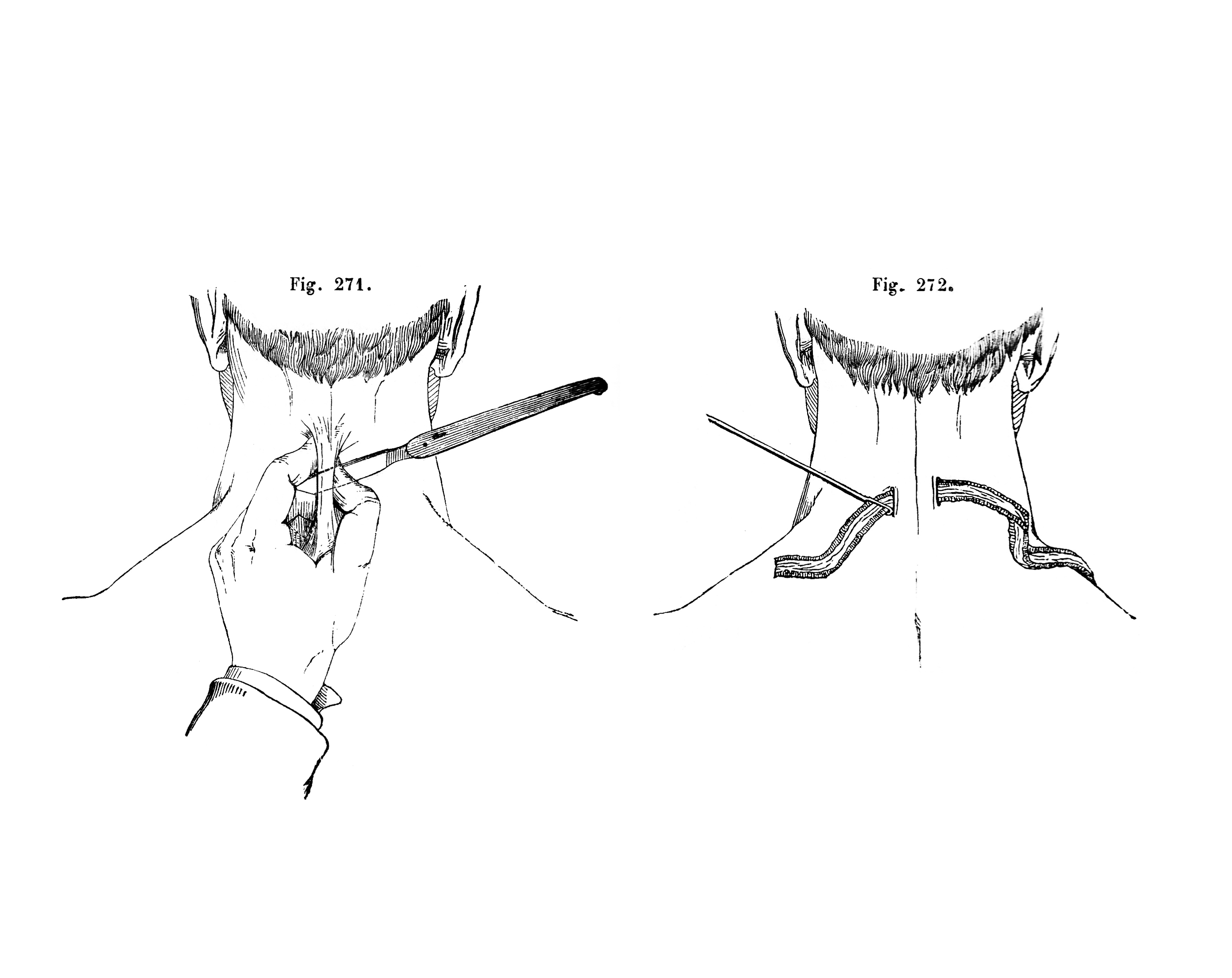 Setzen eines Haarseils. Eröffnen des Kanals. Durchziehen des Haarseils.